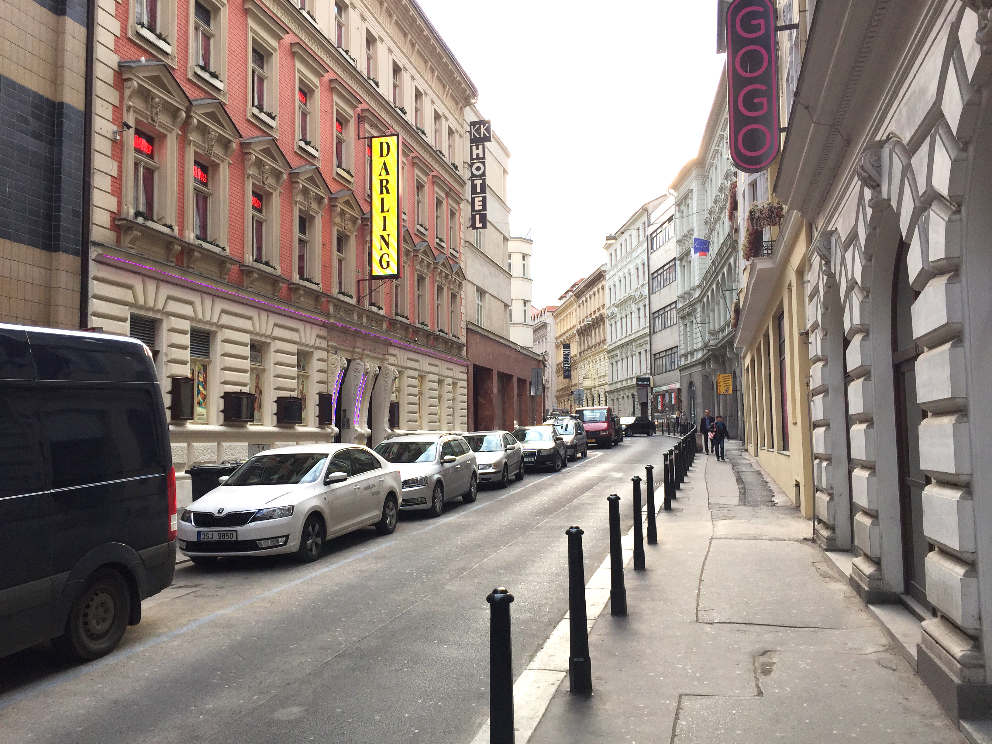 Ulice Ve smečkách v Praze